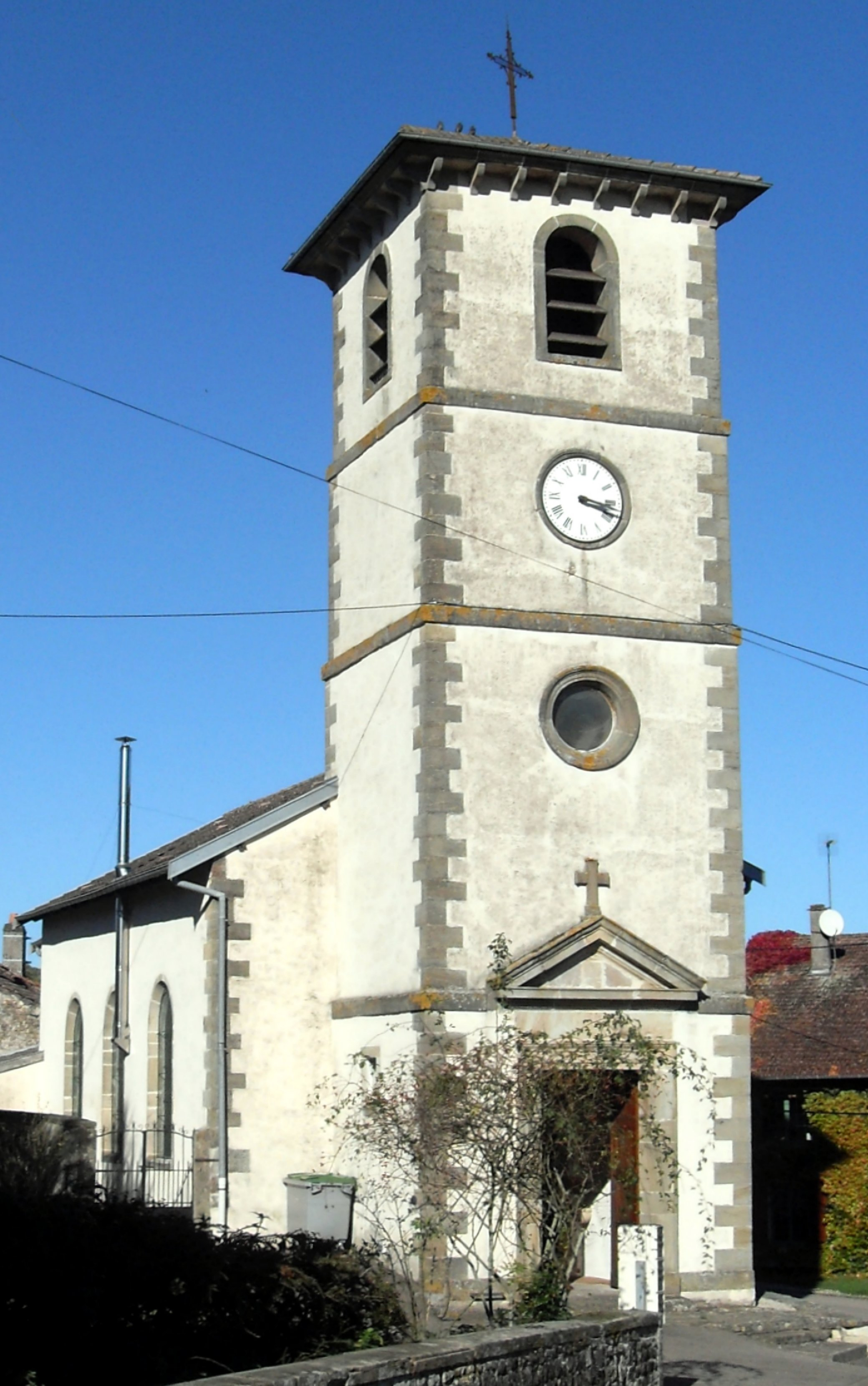 L'église Saint-Epvre à Domèvre-sous-Montfort